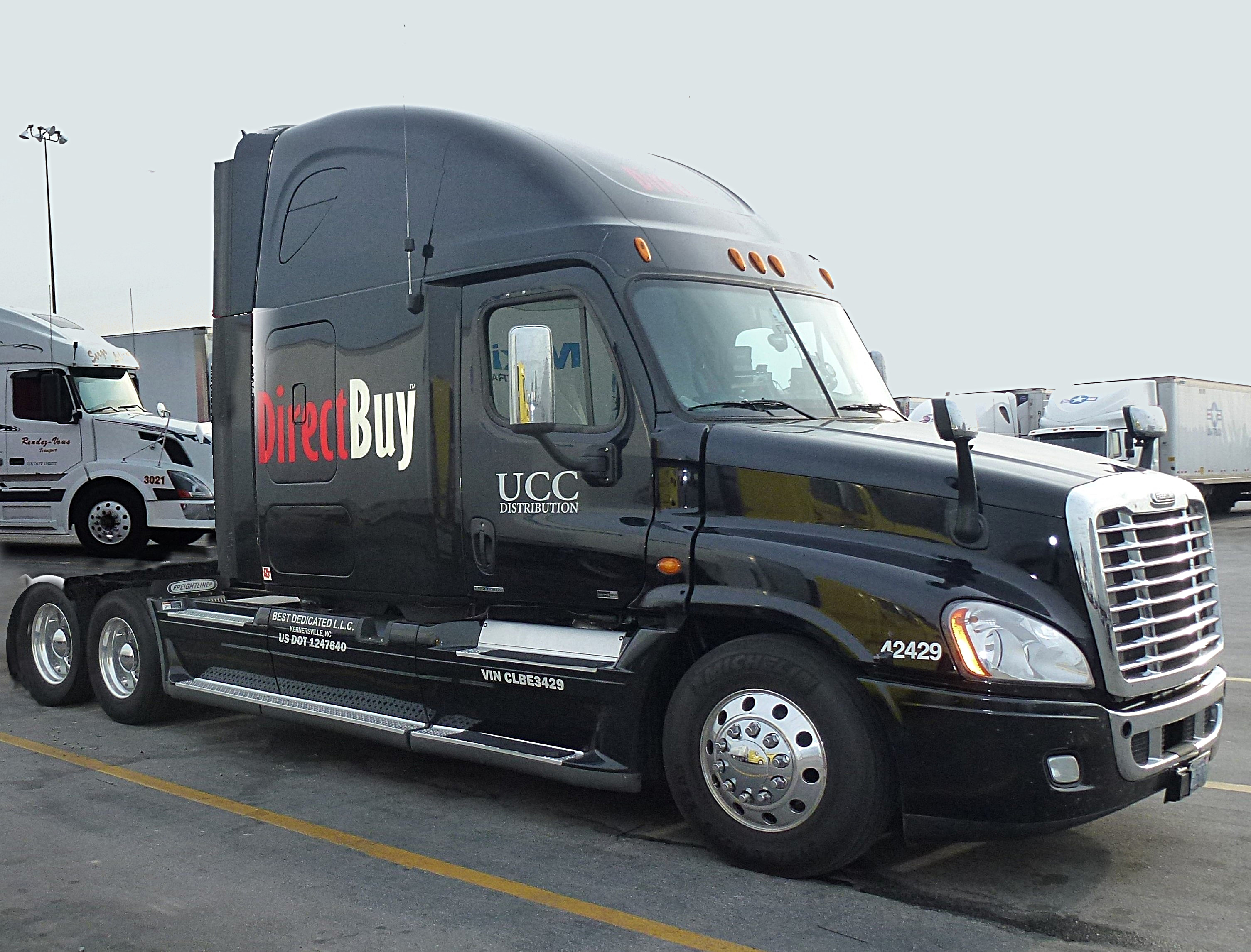 Cabine du Freightliner Bakersfield, Freightliner Cascadia at Flying J Travel Plaza (California. USA).